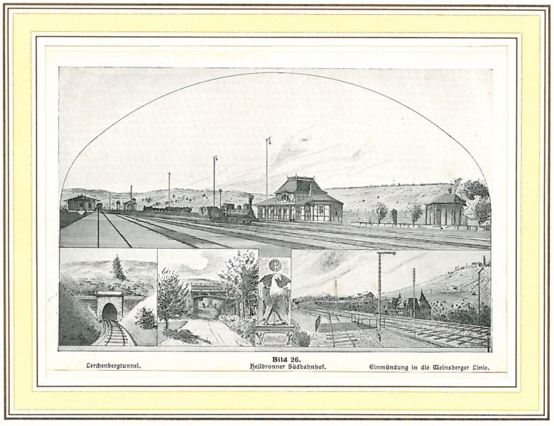 s.o.